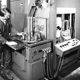 UNITHERMA von 1960